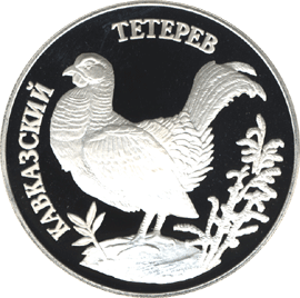 Серия: «Красная книга», Кавказский тетерев, 1 рубль, реверс. Серебро.